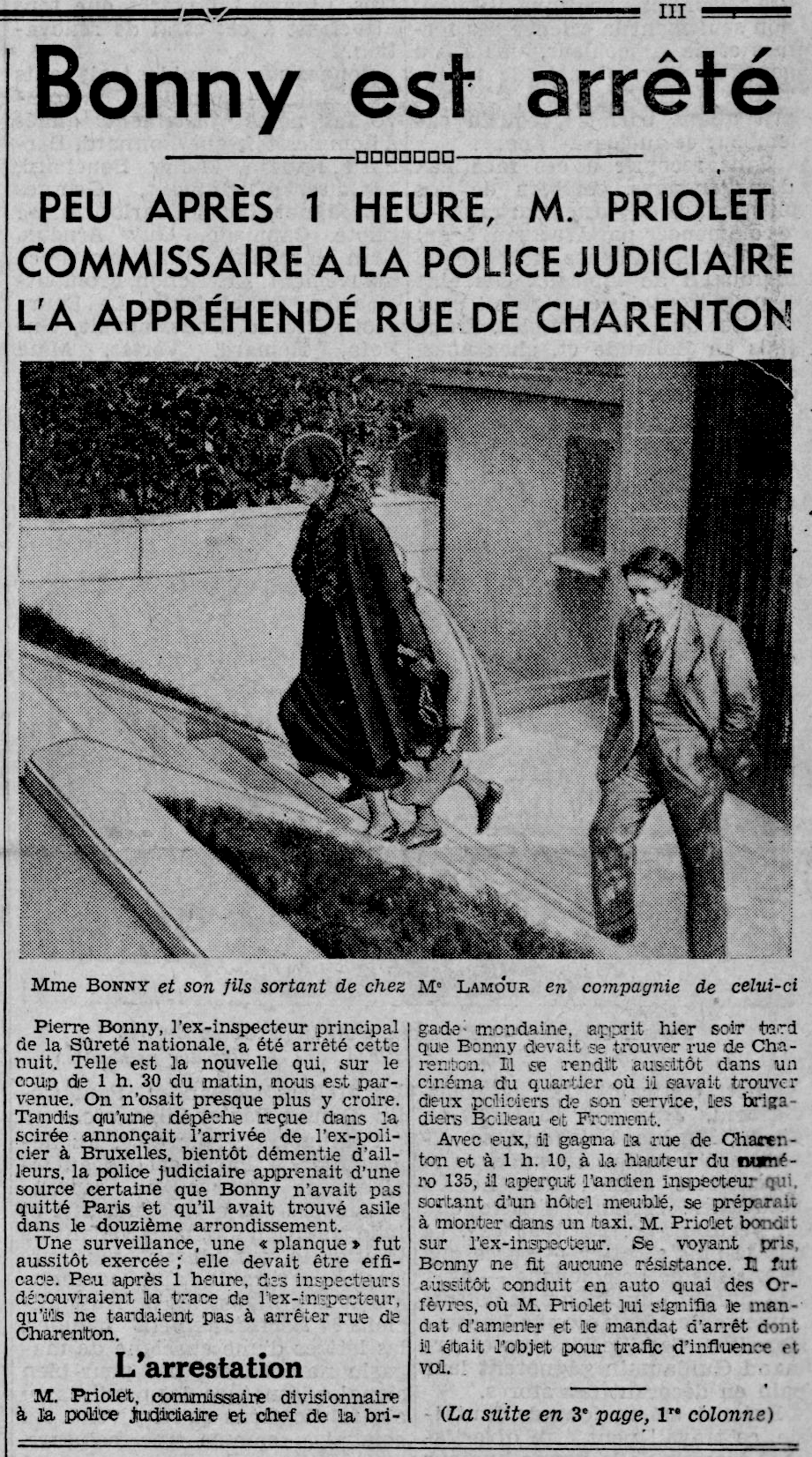 L"arrestation de l'ex-inspecteur Pierre Bonny annoncée à la Une du quotidien Le Journal le 14 mars 1935